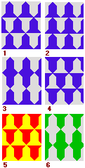 Vajro.